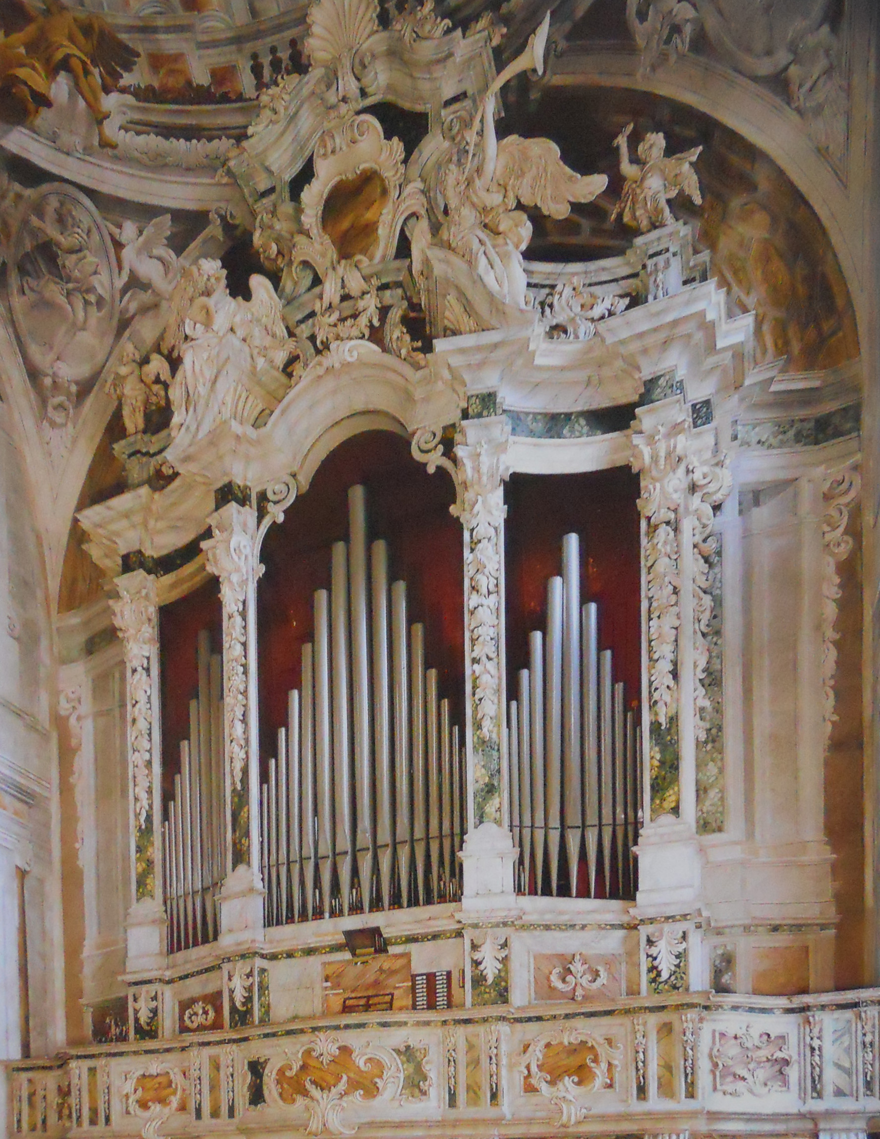 San Faustino maggiore (Brescia), l'organo